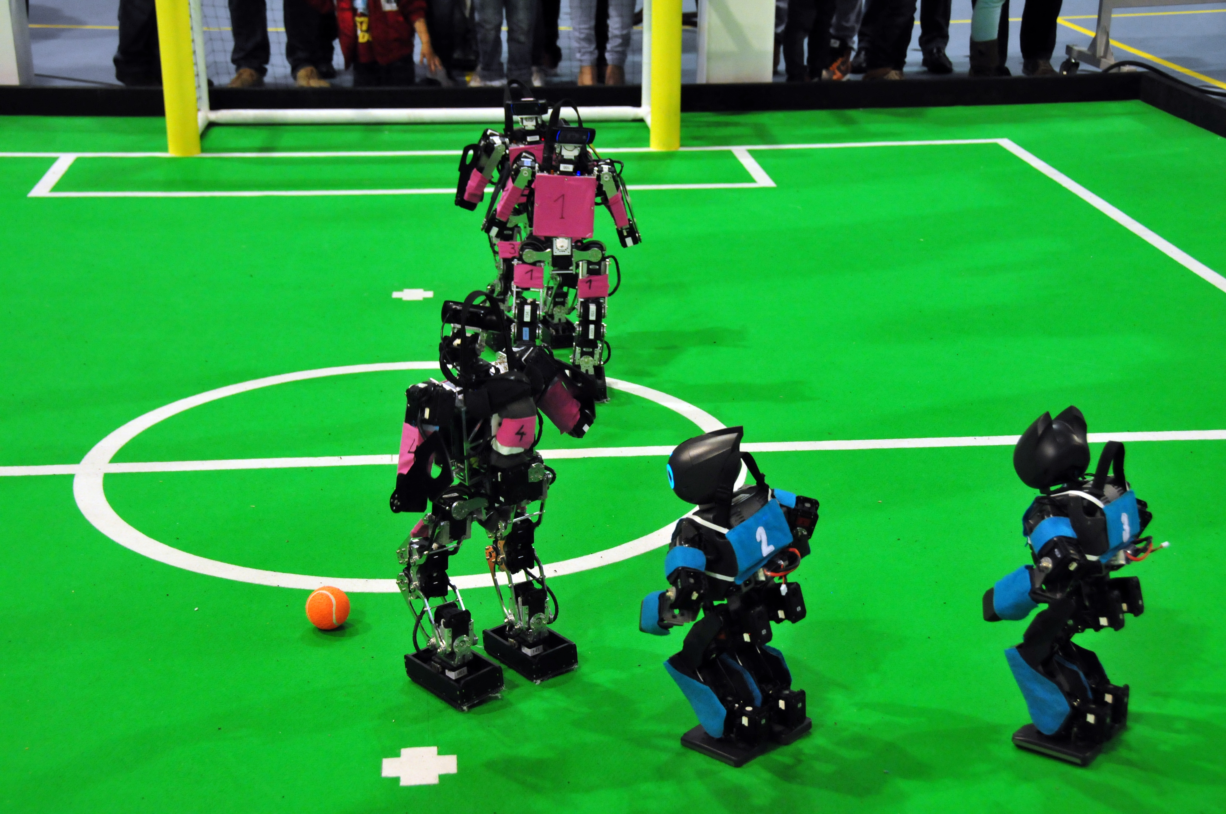 Eindhoven, Niederlande, Robocup 2013